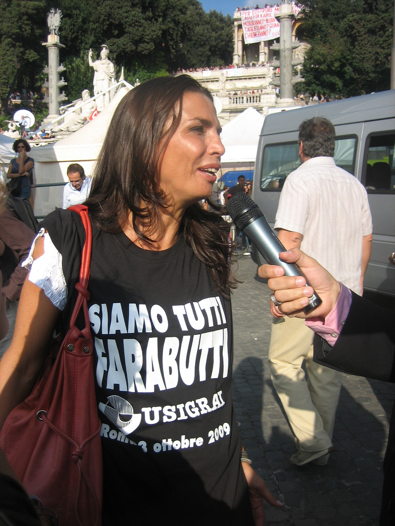 Maria Cuffaro, conduttrice e giornalista del TG3 mentre viene intervistata. Indossa la maglietta con la scritta "Siamo tutti farabutti".